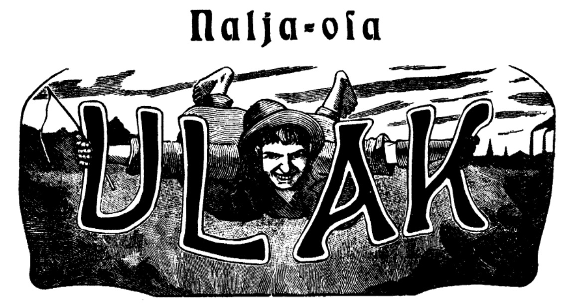 Ajakirja Ulak päismik